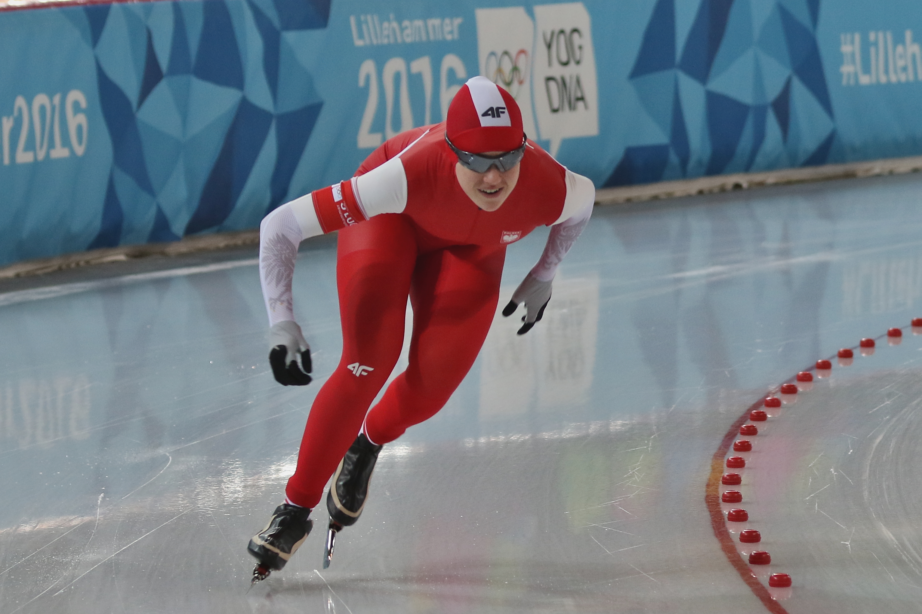 Lillehammer 2016 - Speed skating Ladies' 500m race 2 - Karolina Gasecka